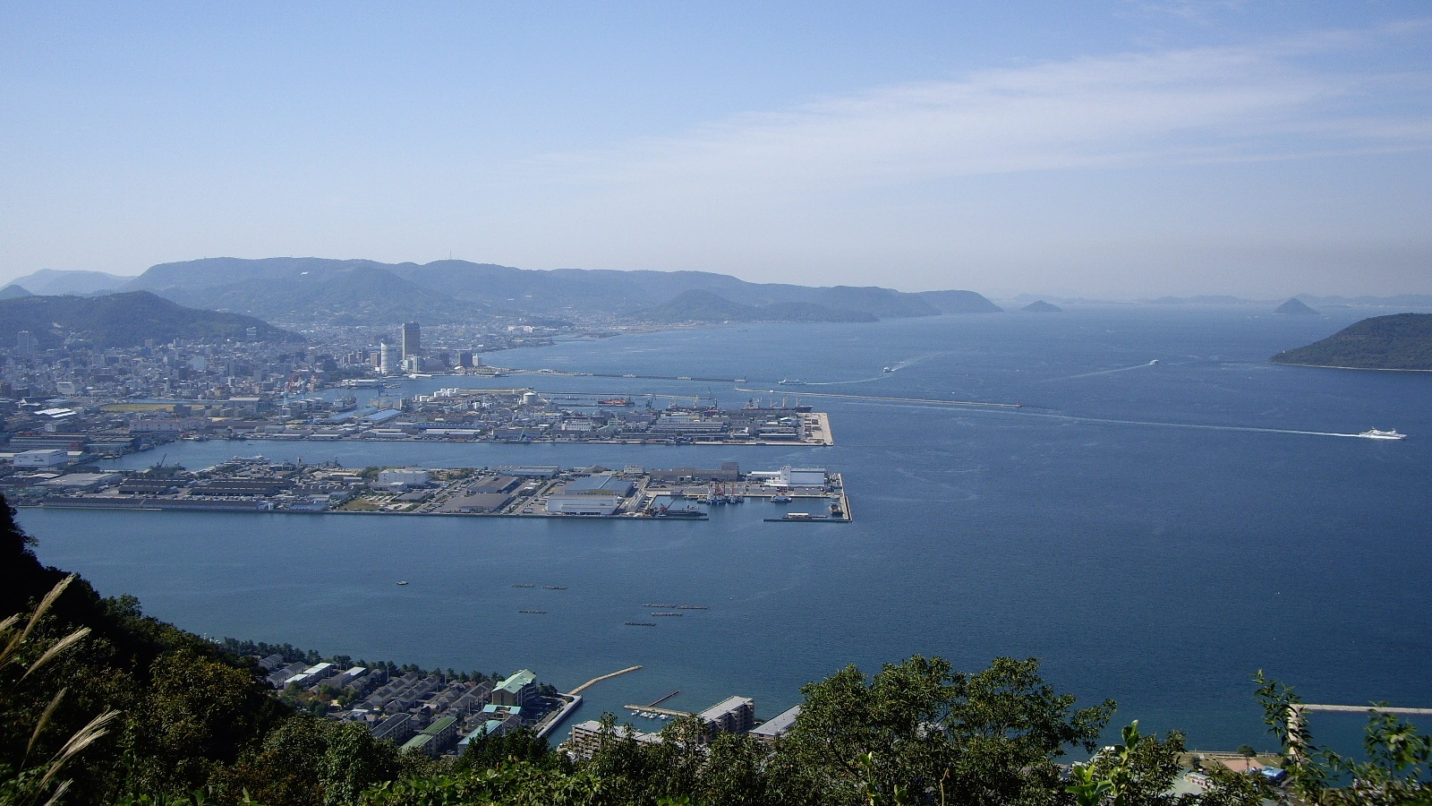 屋島から見た高松市沿岸 - 日本国香川県高松市。